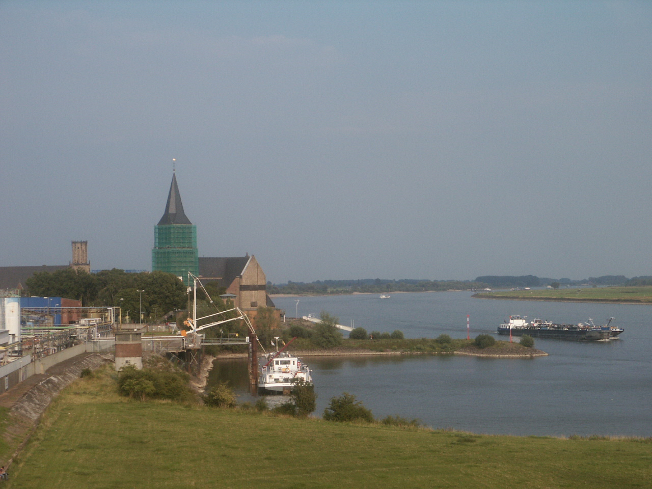 Emmerik, uitzicht vanaf de brug over de Rijn